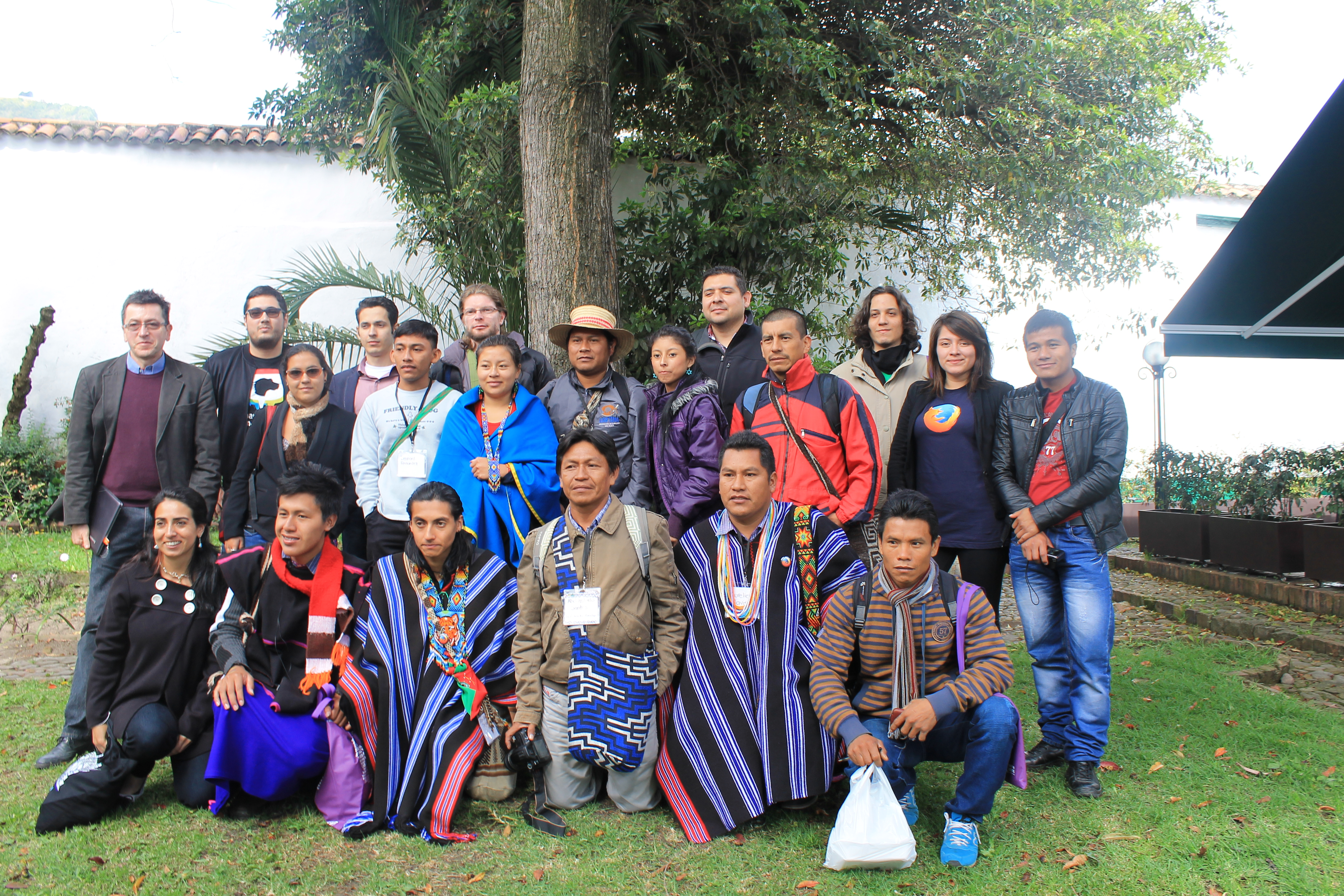 El Encuentro de Activistas Digitales de Lenguas Indígenas se llevó a cabo en las instalaciones del Instituto Caro y Cuervo en Bogotá,los días 18, 19 y 20 de junio de 2015.